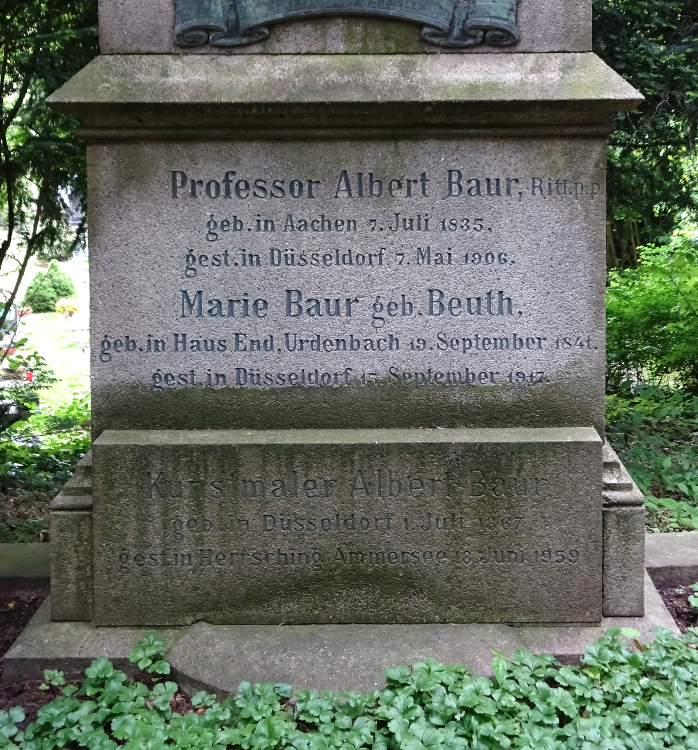 Grabinschrift Professor Albert Baur, Marie Baur geb. Beuth, Kunstmaler Albert Baur, Nordfriedhof Düsseldorf